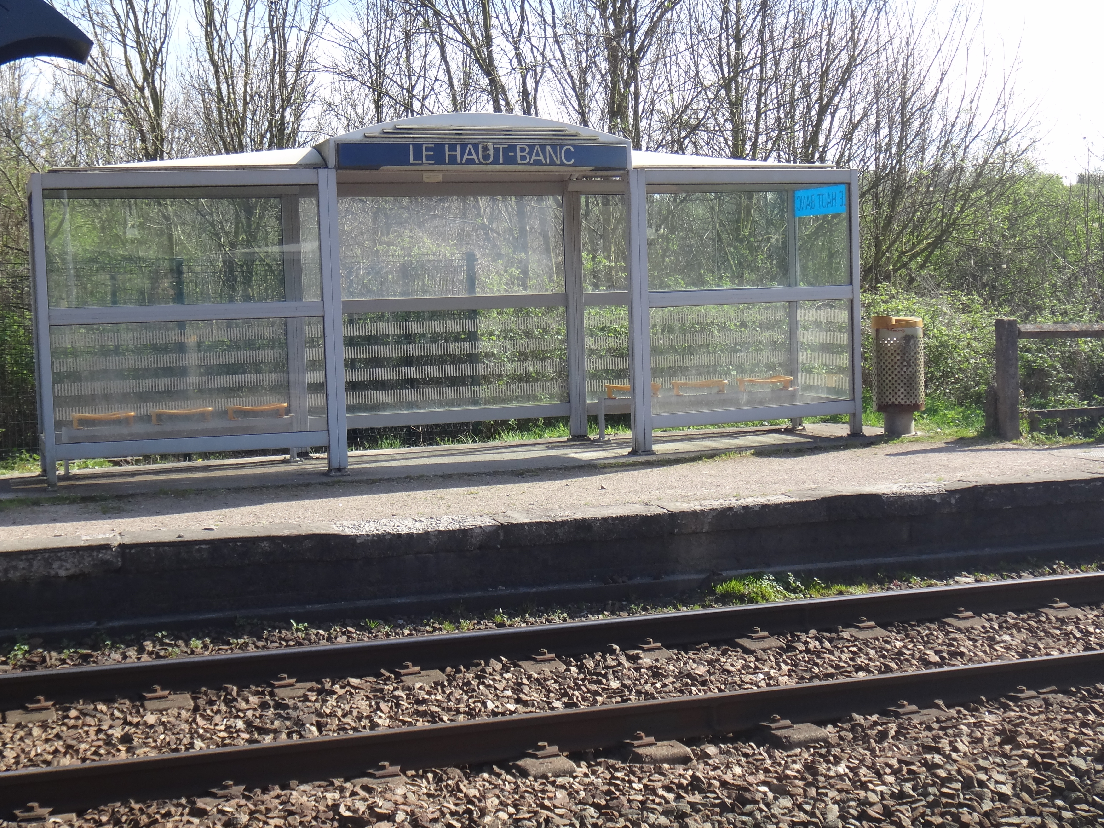 Gare du Haut-Banc, à Ferques, Pas-de-Calais, France, en 2014